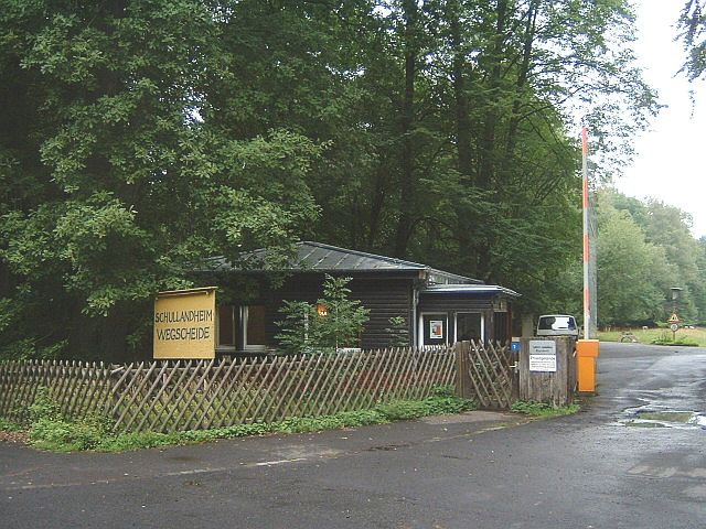 Das Kinderdorf Wegscheide ist das Schullandheim der Stadt Frankfurt am Main im Bereich der Stadt Bad Orb. Dort wird auch Unterricht abgehalten. Dies ist der gesicherte Eingangsbereich.